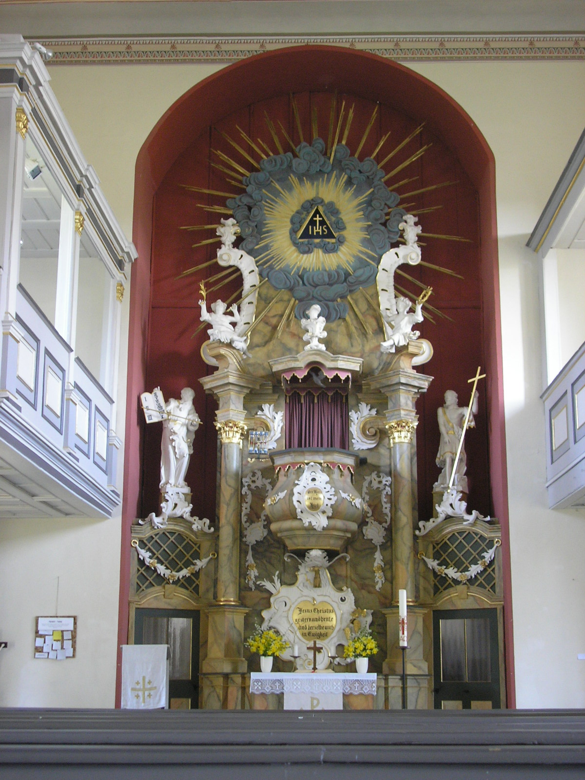 Der Altarraum der Stadtkirche in Schkölen (Thüringen).